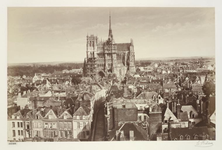 Photographie d'Amiens et sa cathédrale.